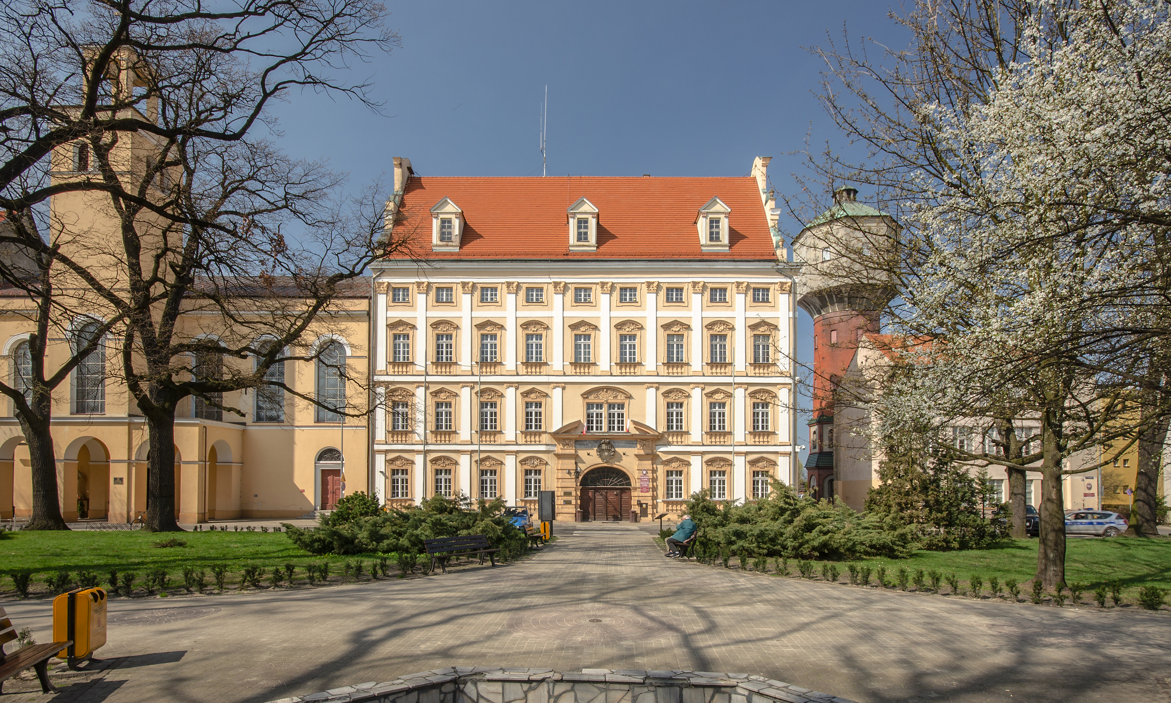 Oława, zamek, 2 poł. XVII